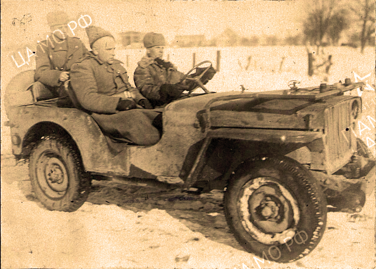 Комбриг гвардии полковник Н. С. Алёшкин в районе Метгетен объезжает боевые порядки